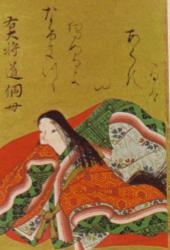 Michitsuna no Haha